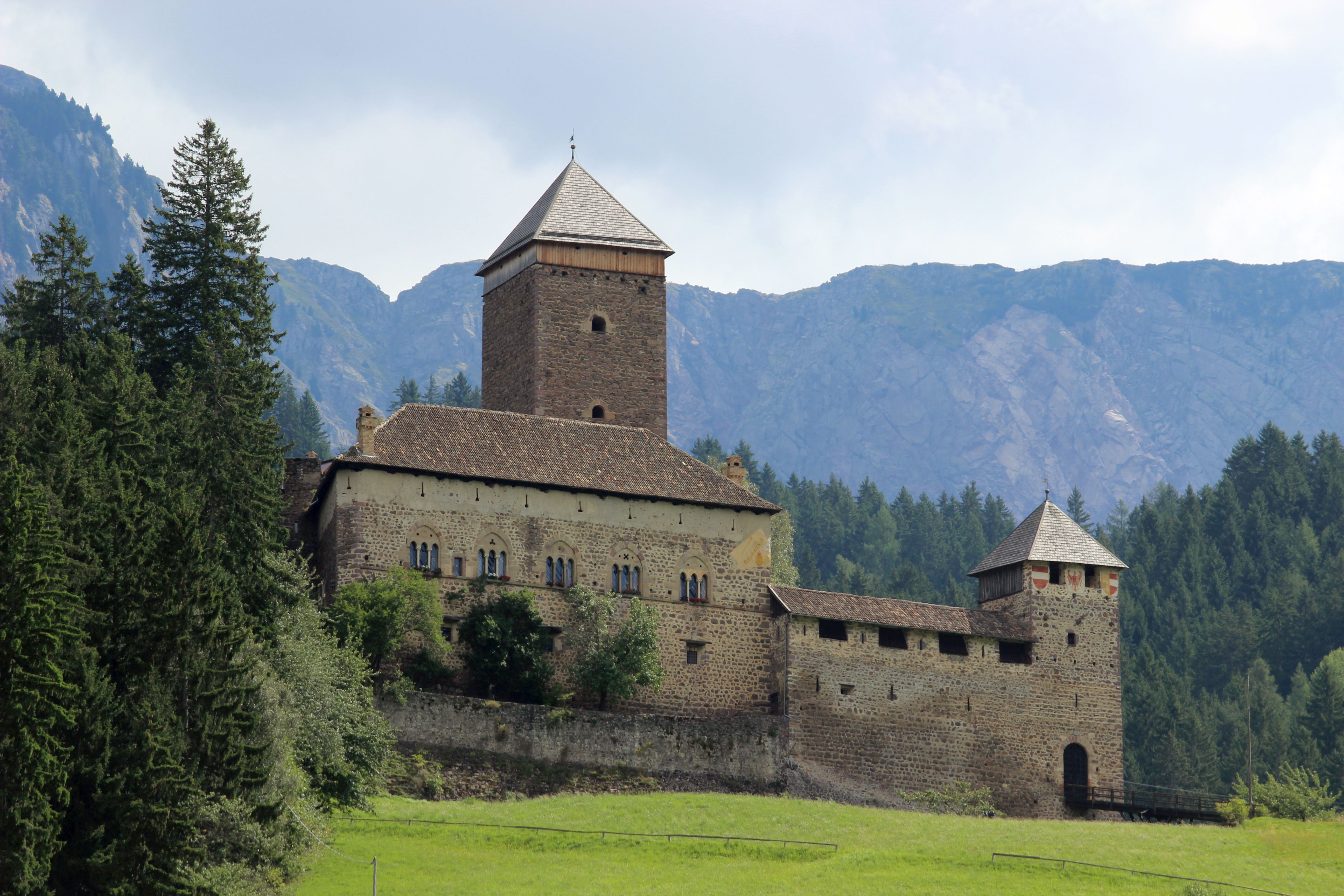 Reinegg im Sarntal